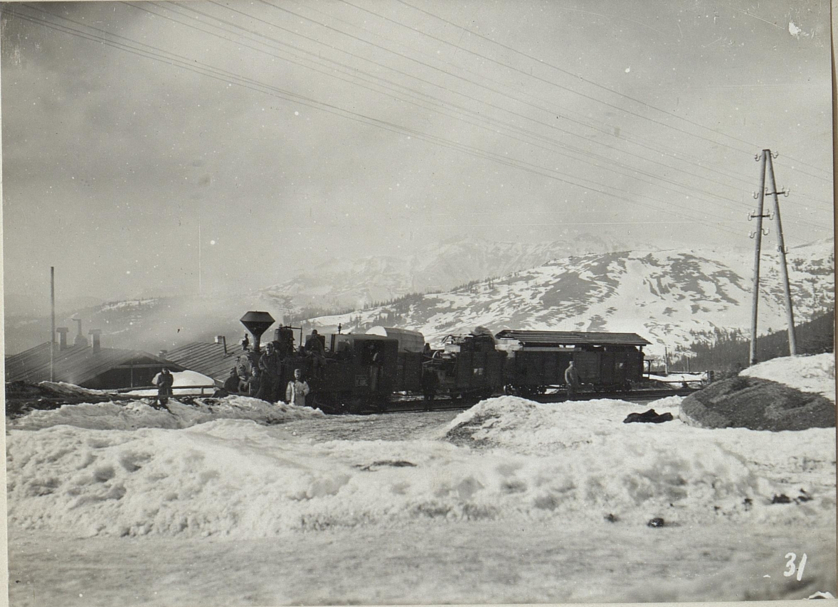 Prislopbahn Spitze